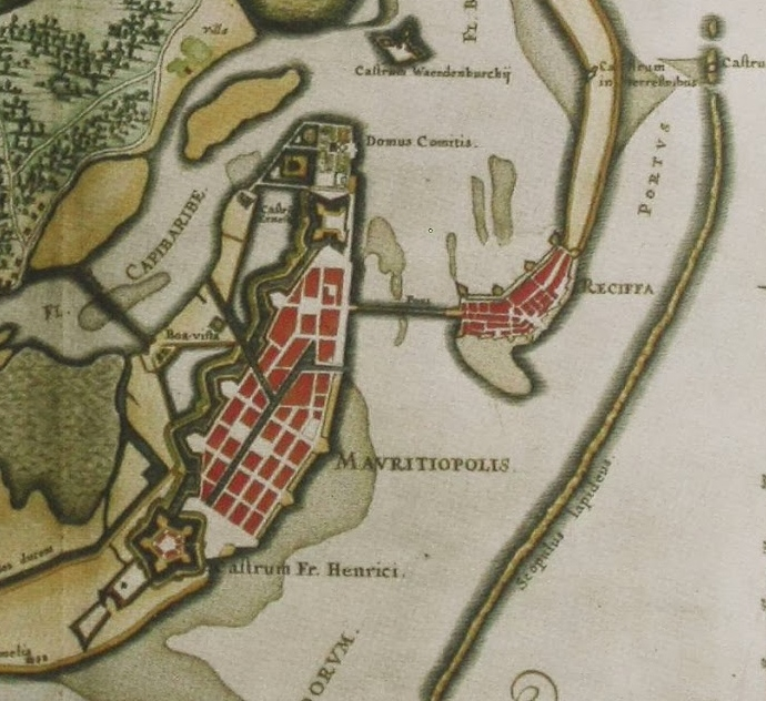 Detalhe do Mapa de Recife em 1644